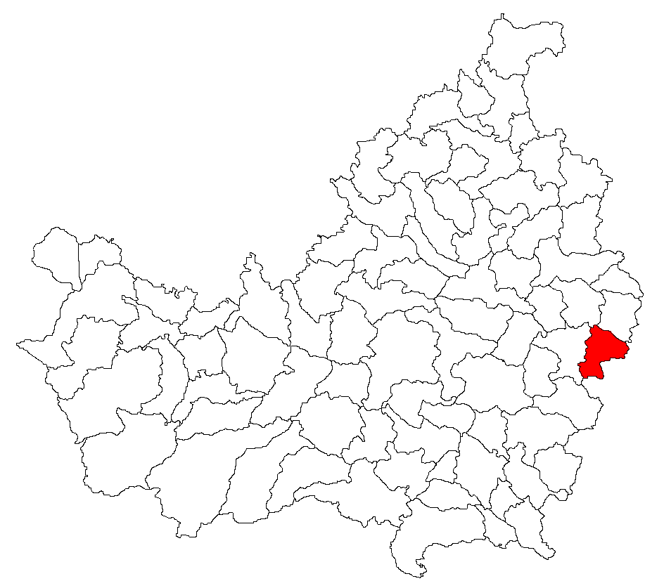 Categorie:Hărţi ale judeţului Cluj